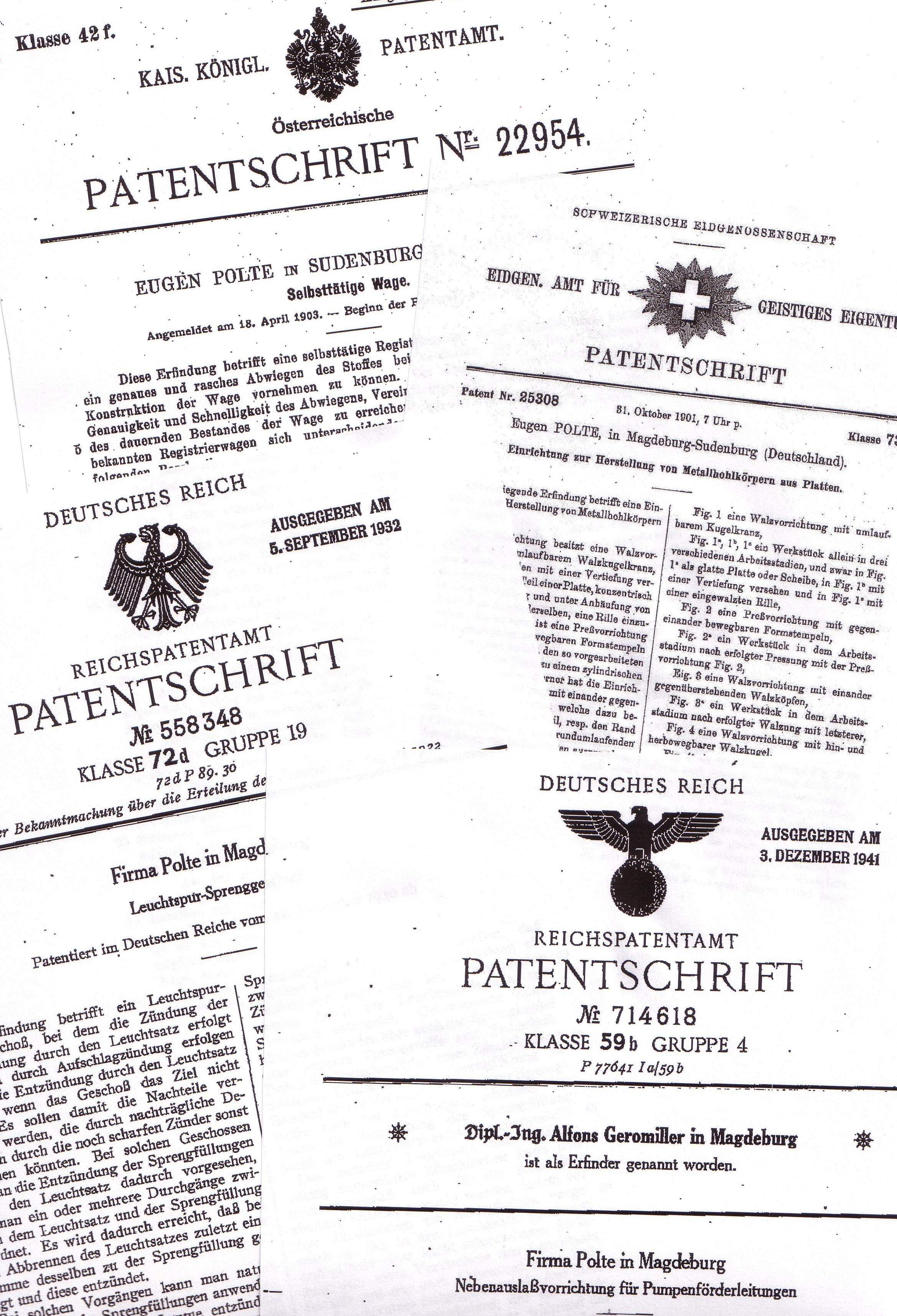 Patente der Firma Polte OHG Magdeburg